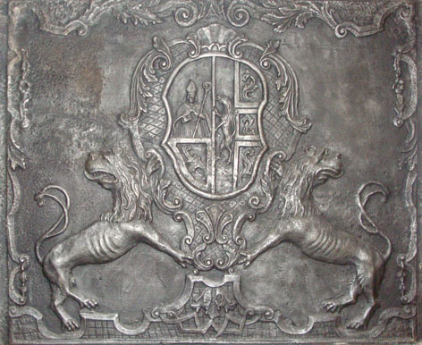 Wappen der Familie GMACHL aus Elixhausen